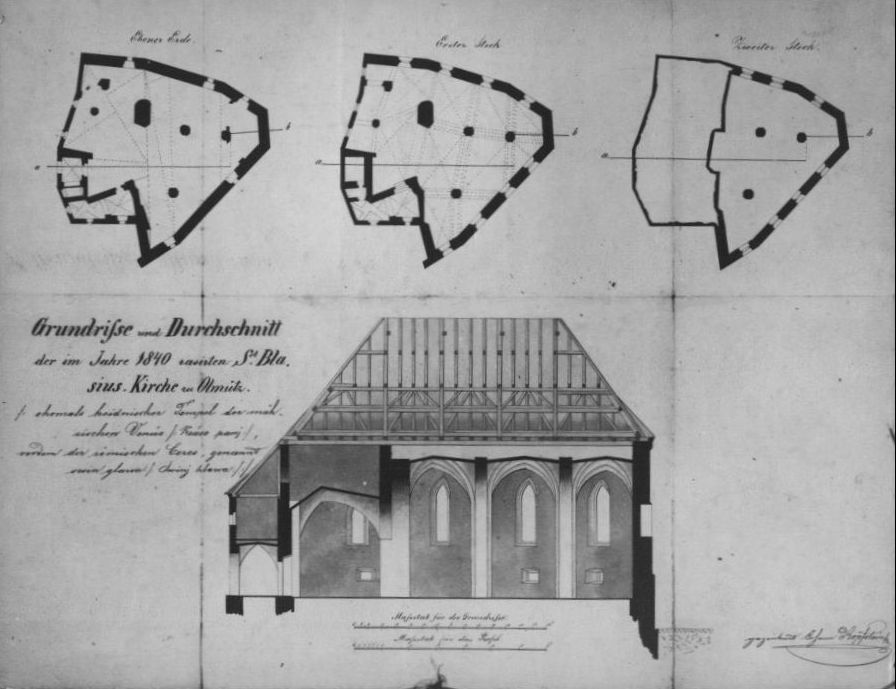 Olomouc půdorys kostel sv. Blažeje